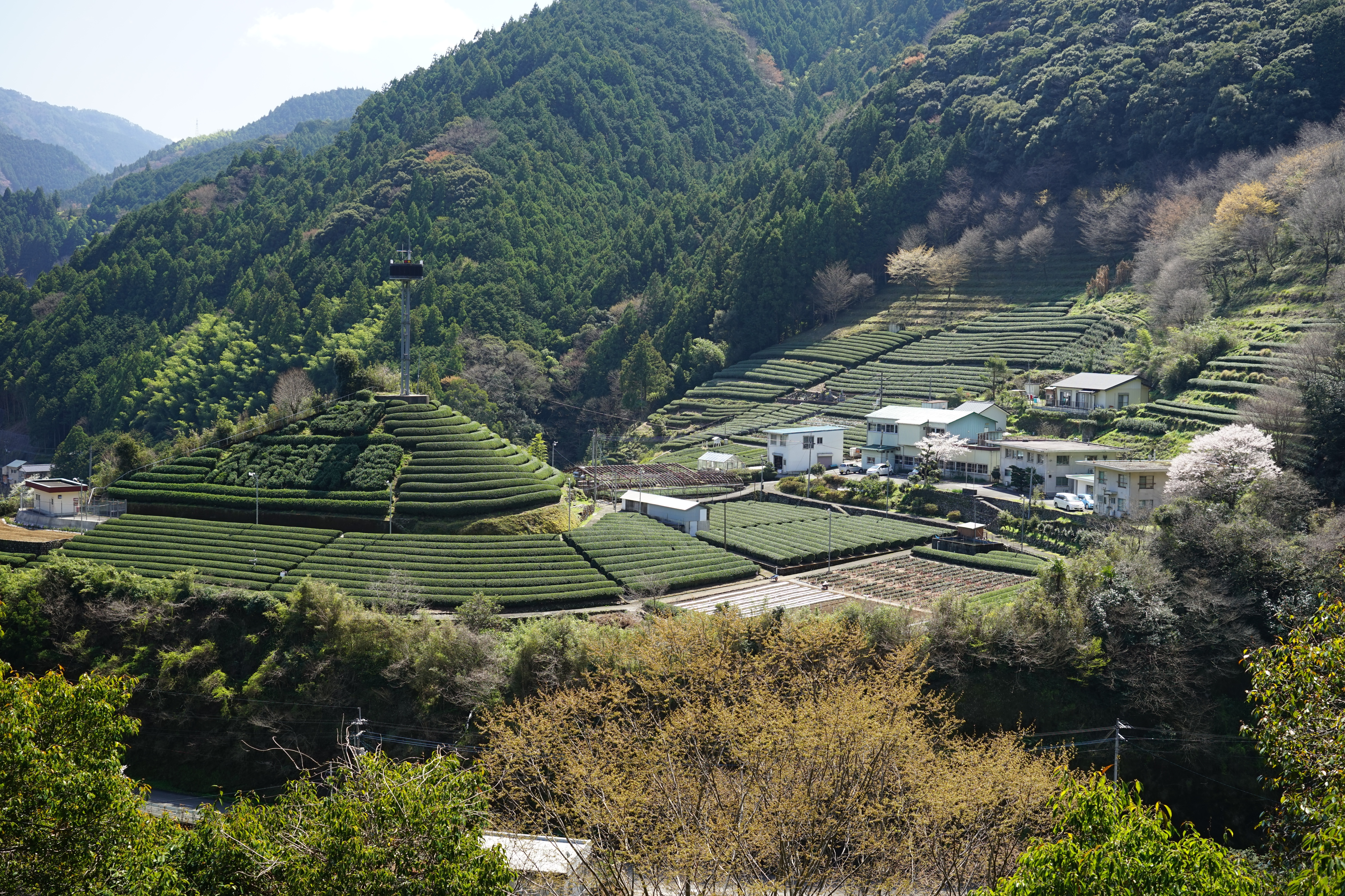 高知茶葉試験場